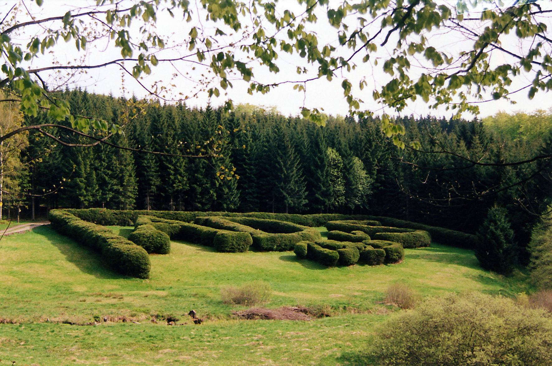 Vielleicht 1985 02.06.2015 06526 Pfaffroda-Schönfeld; Die „Schrift“ (GMP: 50.670511,13.366573). Im Bärenbachtal zwischen Olbernhau und Pfaffroda befindet sich die 1929 angelegte Ornamentpflanzung "ADvS 1929" zum Gedenken an Alfons Diener von Schönberg, bis zu seinem Tode 1936 Schloßherr auf Pfaffroda. Die Aufnahme des Fotografen Fotoatelier Hermann Schmidt, Freiberger Str. 28, Olbernhau, wurde vom derzeitigen Firmeninhaber Fotografenmeister Kristian Hahn, ebenda, am 19.03.2014 Dr. Jörg Blobelt zum Zwecke der Veröffentlichung übergeben. 20140319010AR.JPG(c)Hermann Schmidt, Olbernhau (Kristian Hahn)